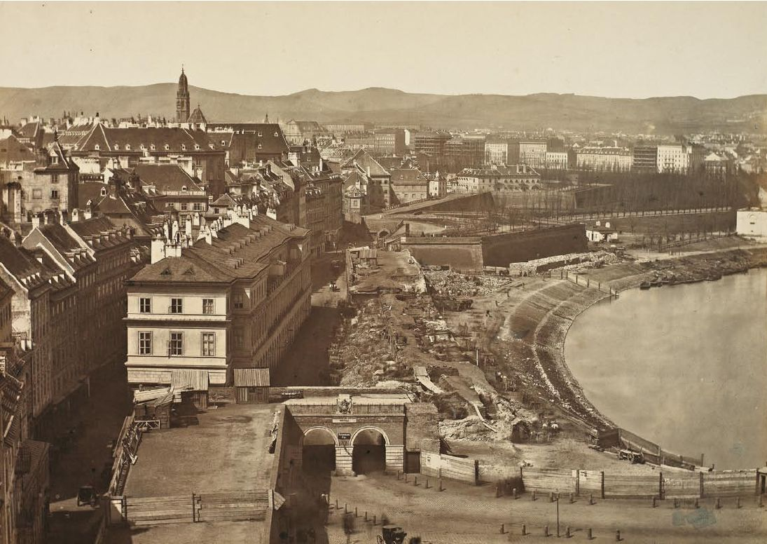 Blick von der Franz-Josefs-Kaserne auf das Rotenturmtor. Beginn der Abbrucharbeiten an der Wiener Stadtmauer. Die Franz-Josefs-Kaserne stand etwa dort, wo heute der Häuserblock zwischen Biberstraße und Stubenring ist. Unter dem vordersten Mauerstück befand sich das Laurenzertor. Die zweibogige Durchfahrt ist das (neue) Rotenturmtor. Der schon geschliffene Teil hat keinen festen Namen und wird Rotenturmbastei oder auch Gonzagabastei genannt. Der dreieckige Mauerspitz im Hintergrund ist die echte Gonzagabastei. Links davon sieht man ein Stück des Fischertors. Der Kirchturm links hinten ist Maria am Gestade. Gleich rechts neben dem höchsten Dach in der Stadt sieht man in der Bildmitte die markante Fassade der ehemaligen Schwarzspanierkirche. Die Häuserzeile, die rechts hinten beginnt, istder heutige Schottenring, direkt vor der Rossauerkaserne.